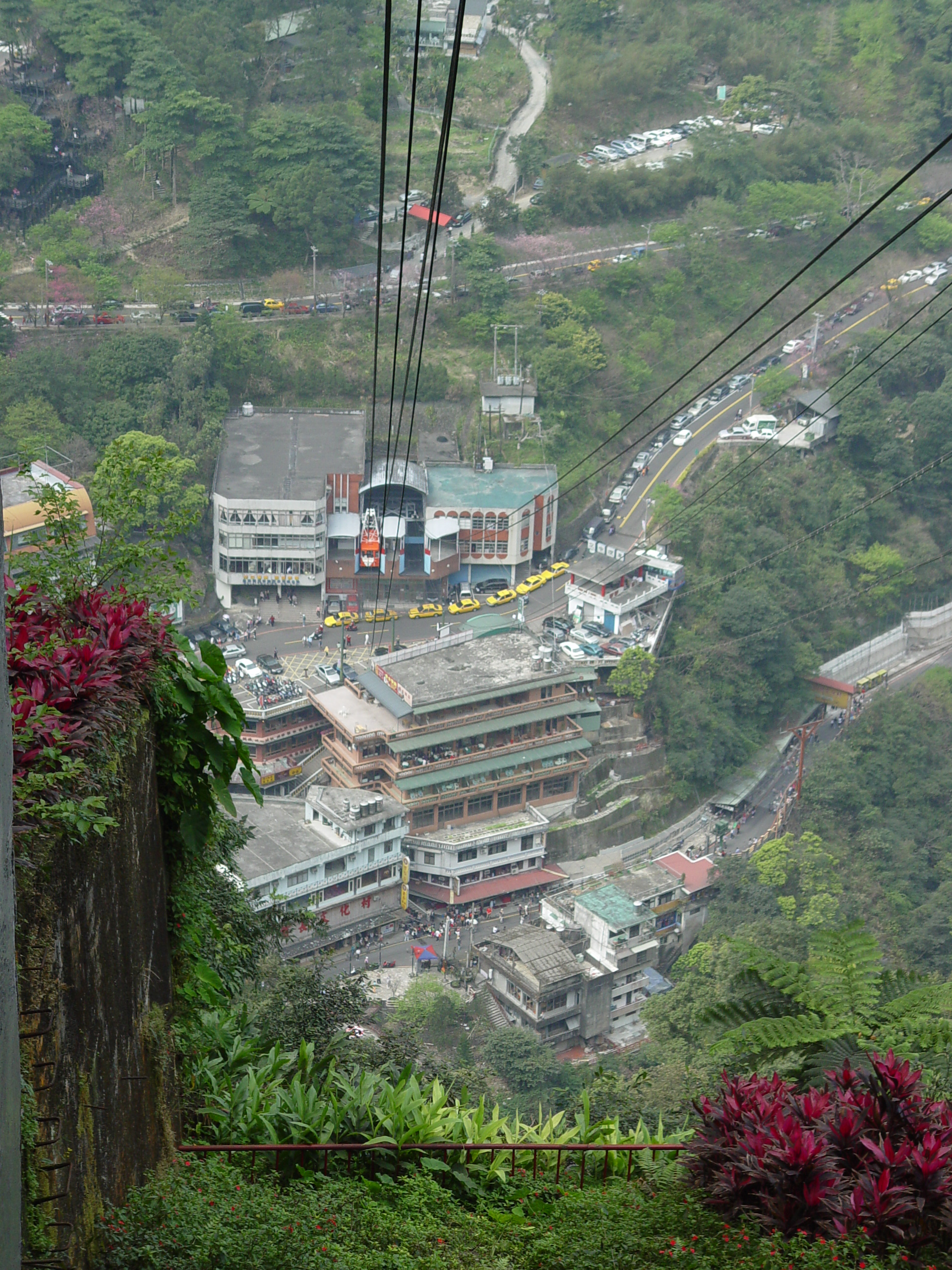 烏來空中纜車站遠眺